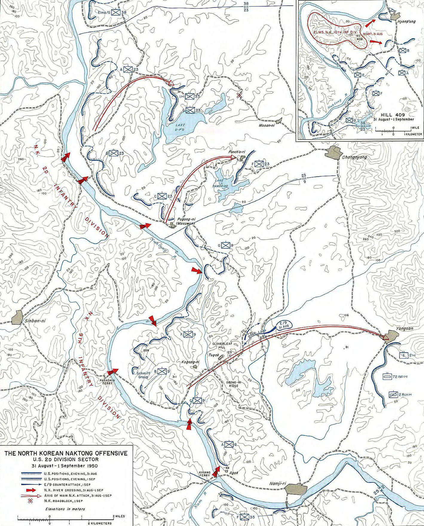 Carte du secteur de la 2e division américaine lors de la Grande offensive du Nakdong correspondant à la Seconde bataille du Nakdong et à la bataille de Yongsan.